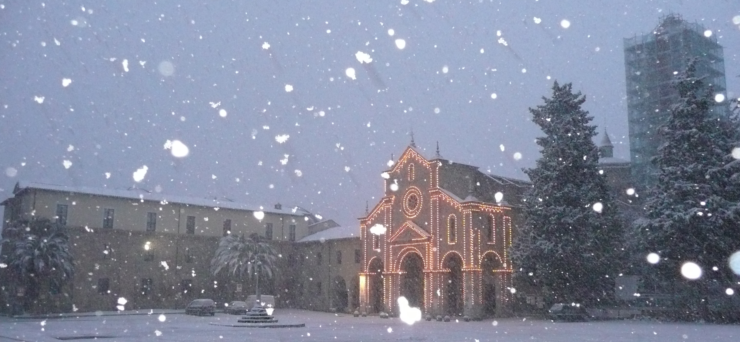 Madonna Delle Grazie a Teramo - con addobbi natalizi, durante una nevicata.